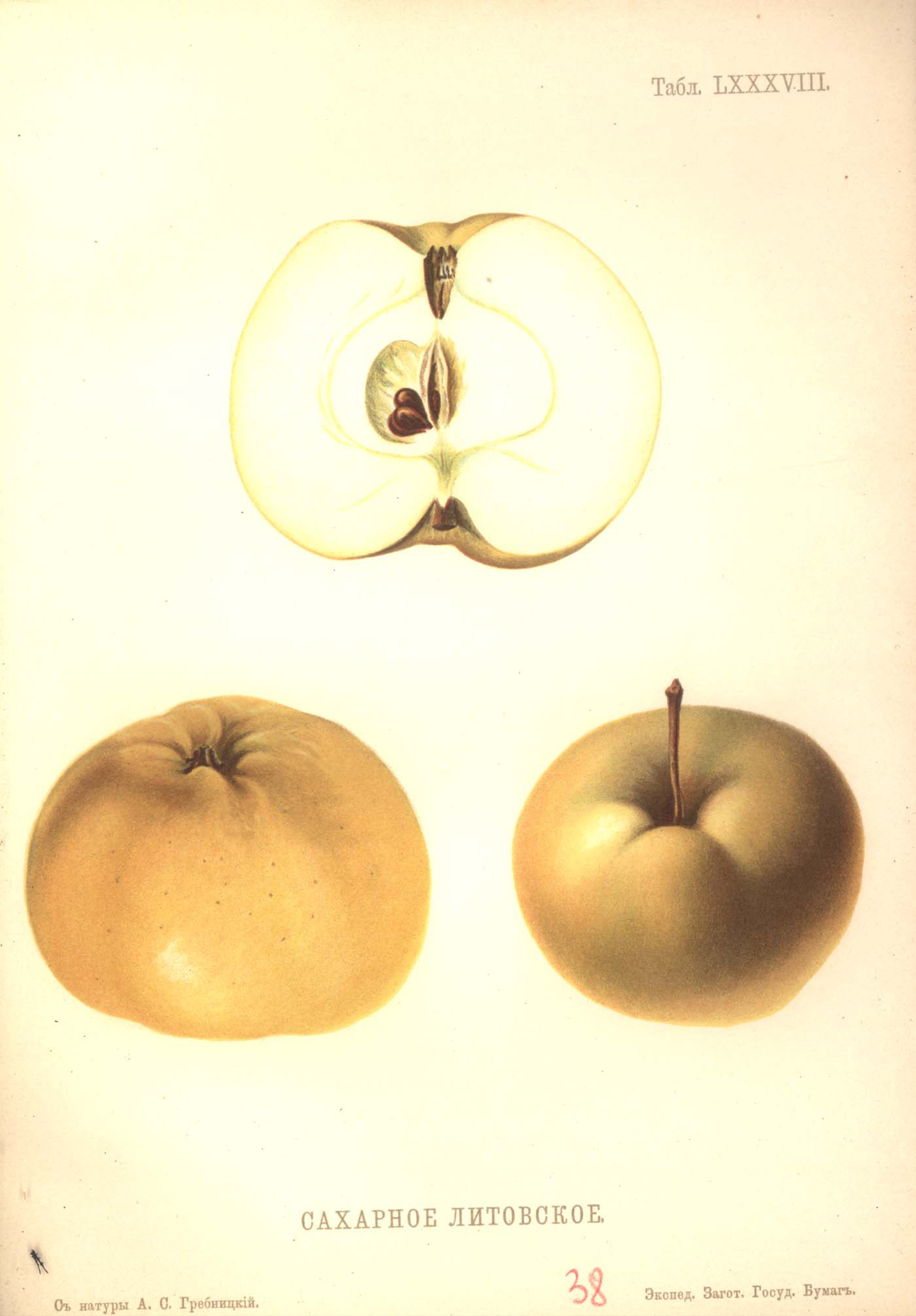 Атлас плодов